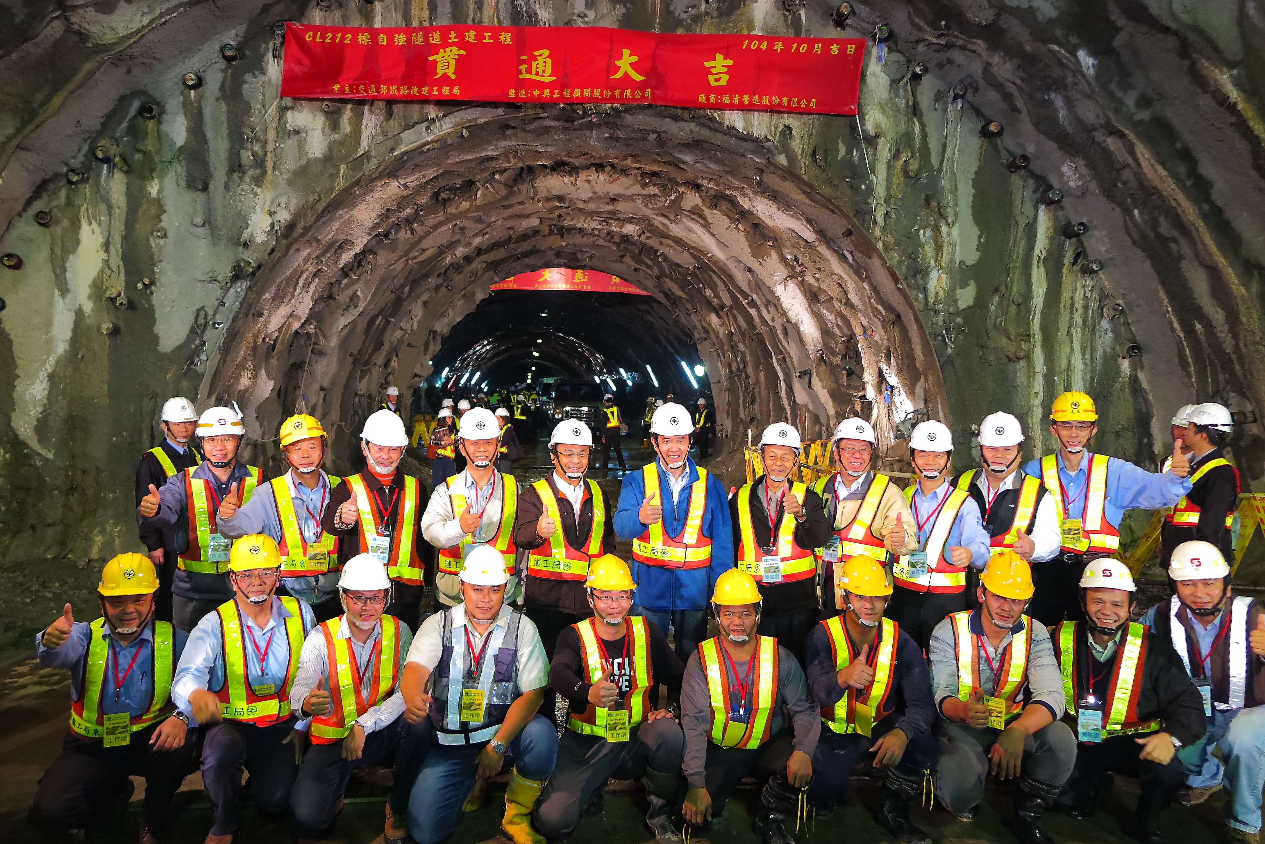 自強隧道開通